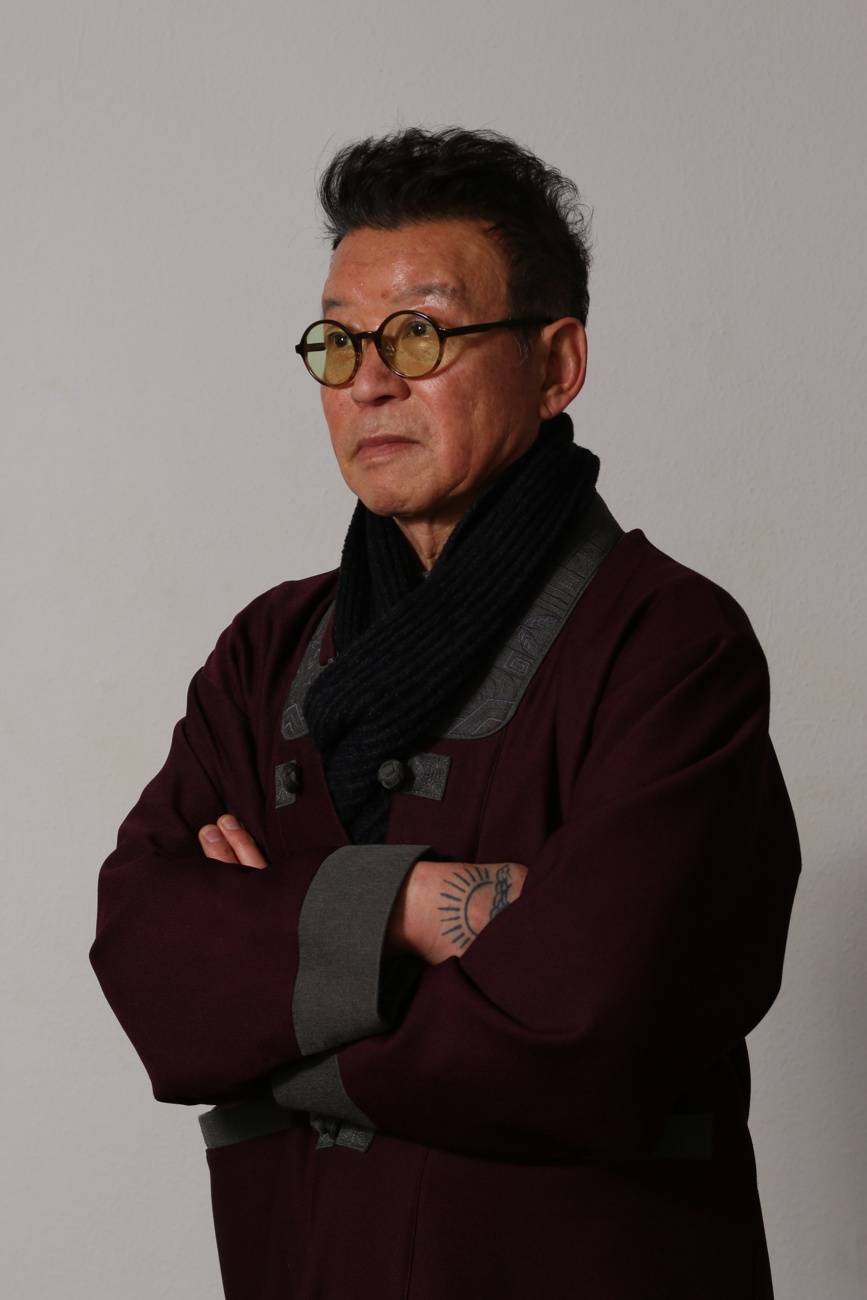 Cha Yong-Kil bei einem Photoshooting 2016 im Dortmunder Sportstudio